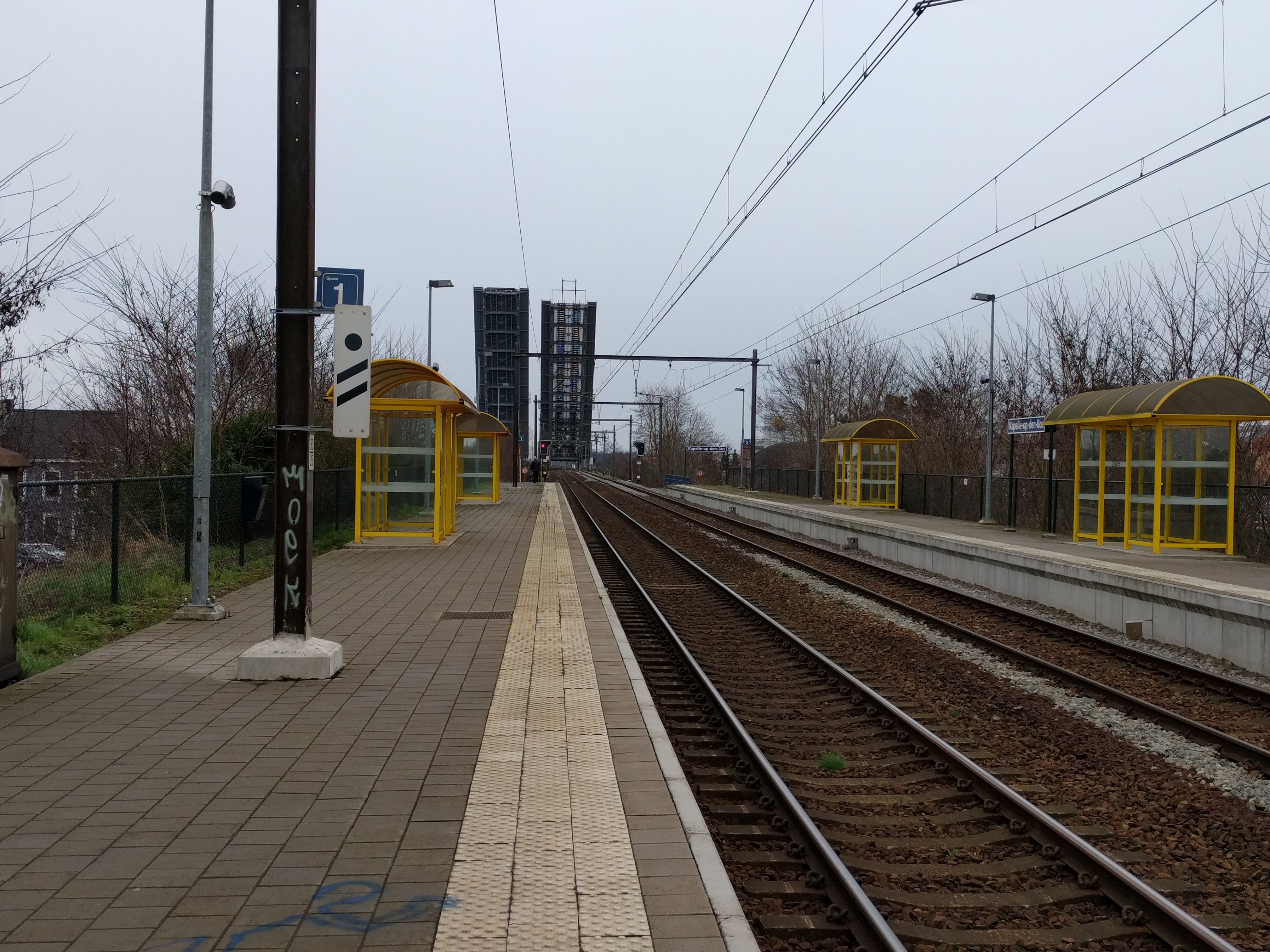 Het treinstation Kapelle-op-den-Bos met de brug over het kanaal omhoog (4 maart 2017).